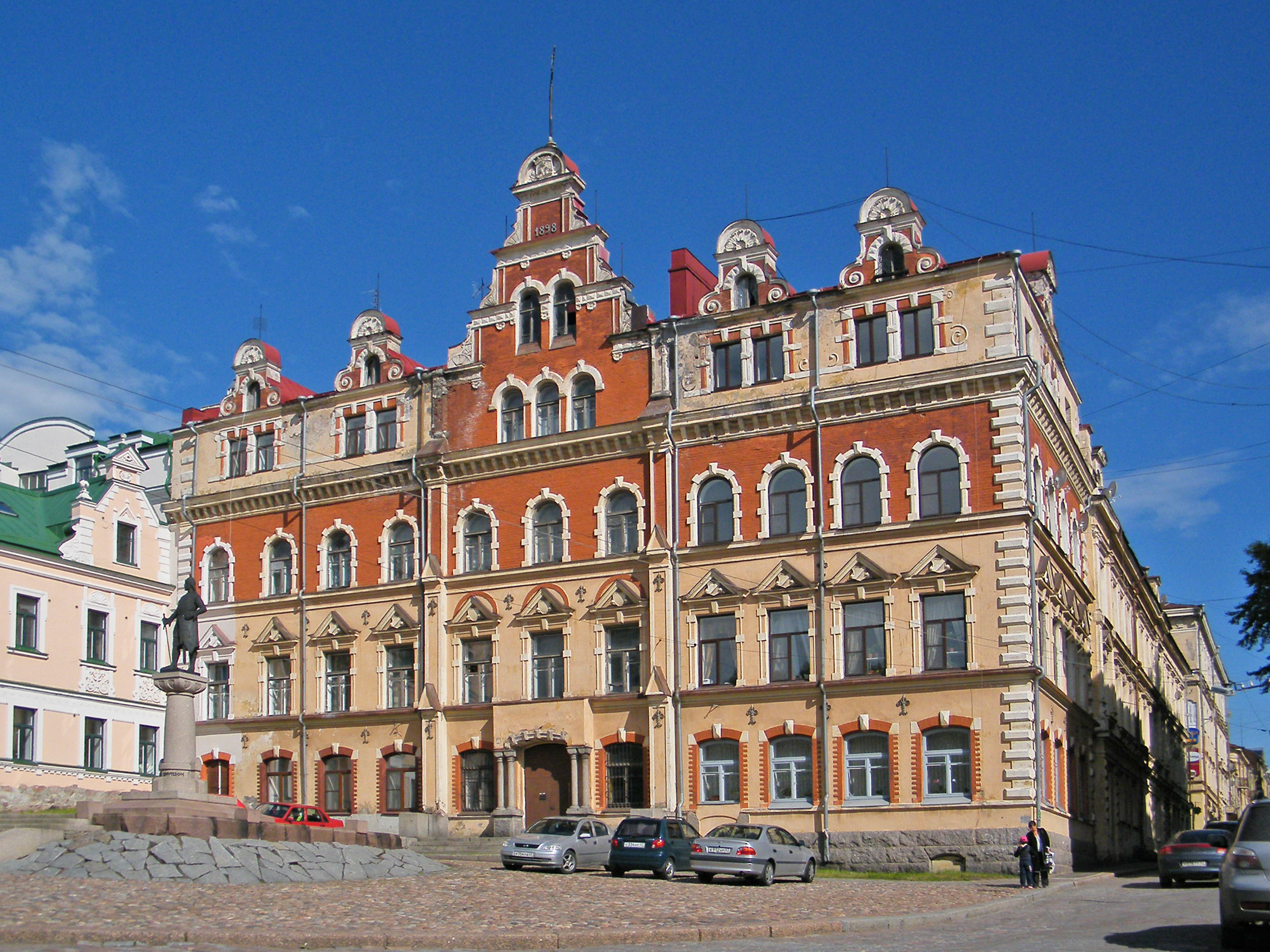 Старая ратуша